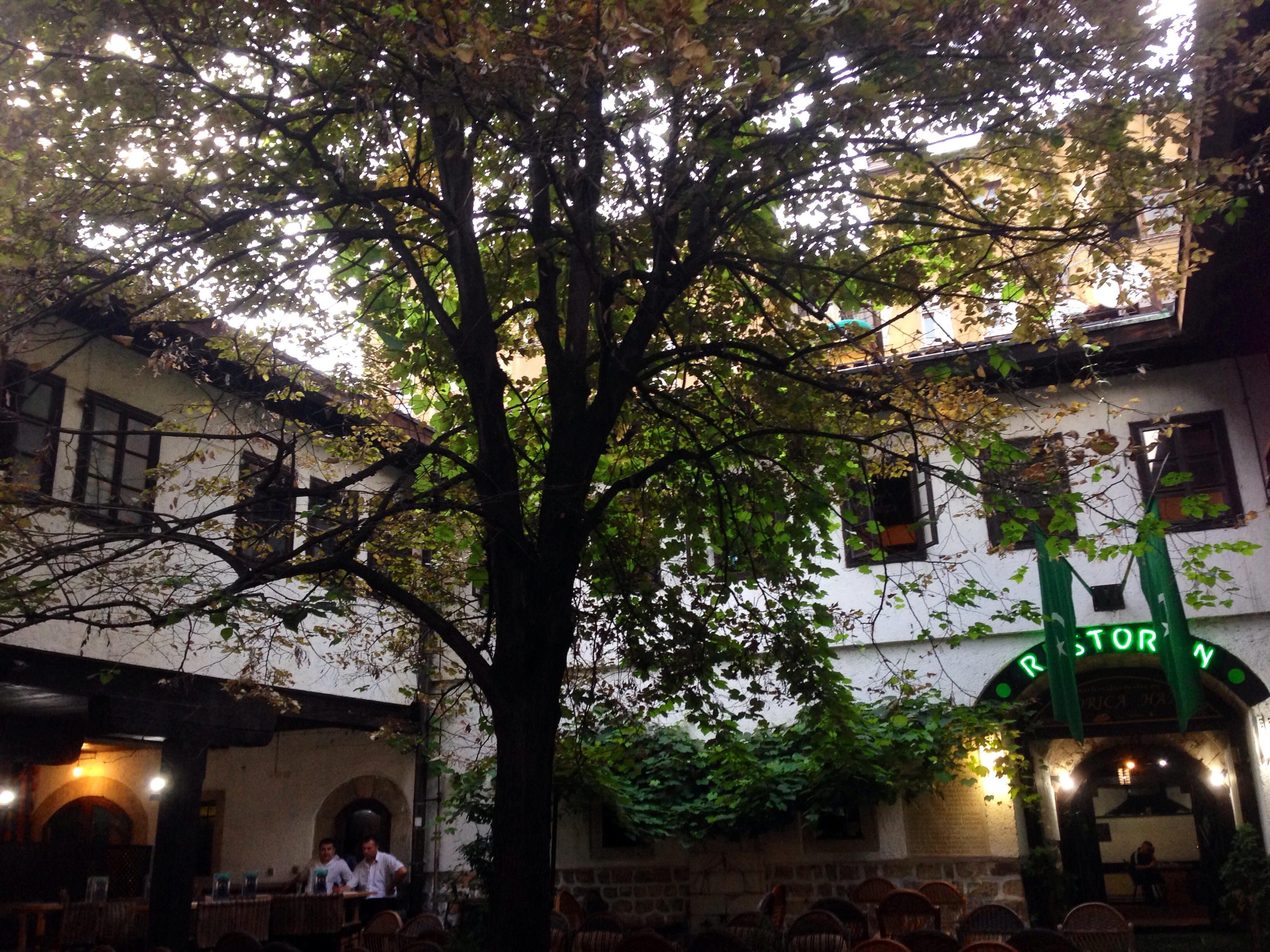 Sarajevo